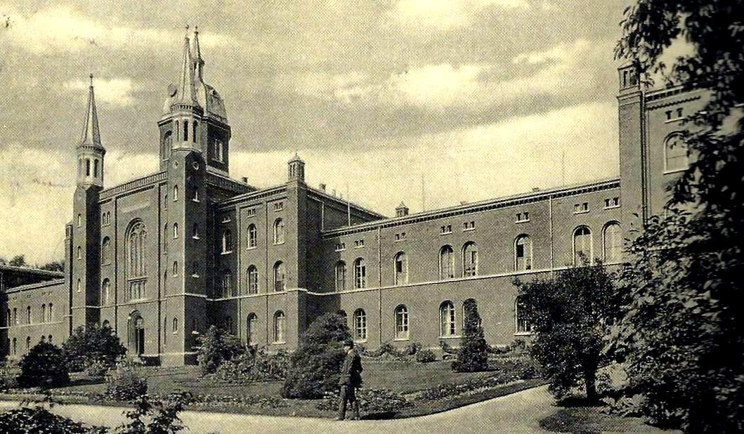 Postkarte mit dem ehemaligen Maria-Hilf-Hospital in Aachen, Kurpark Aachen